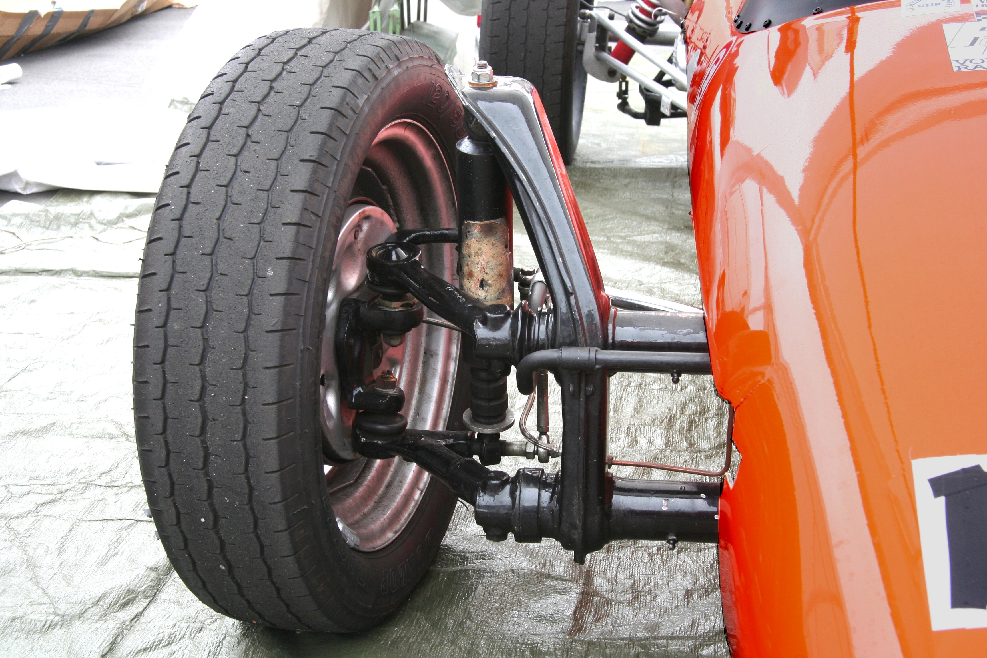 Kurbellenkerachse des VW Typ 1 in einem Formel-V-Wagen